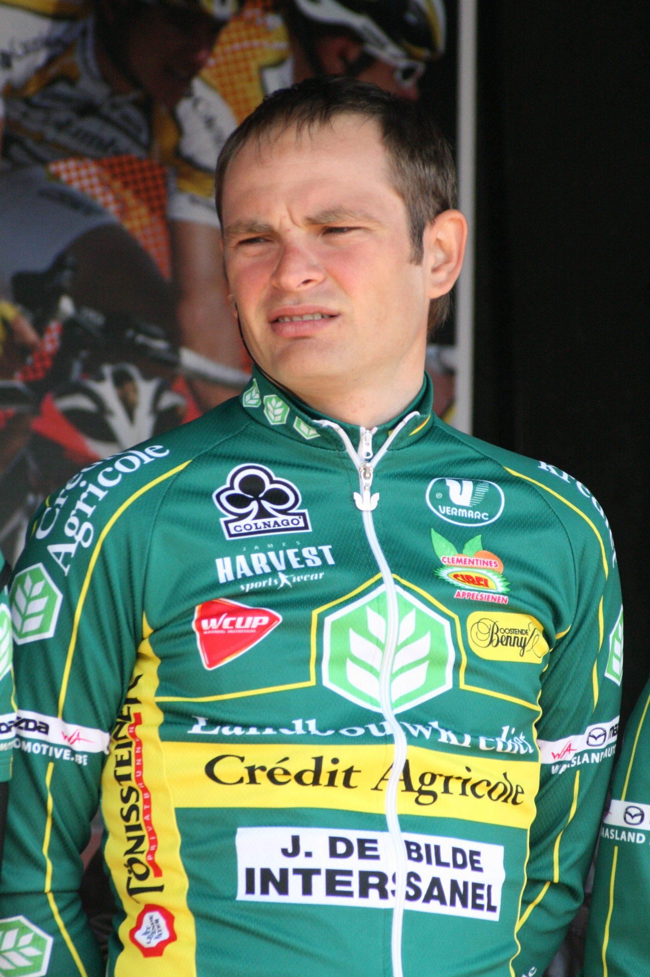 Koen Barbé, lors de la présentation des équipes des 4 jours de Dunkerque 2010